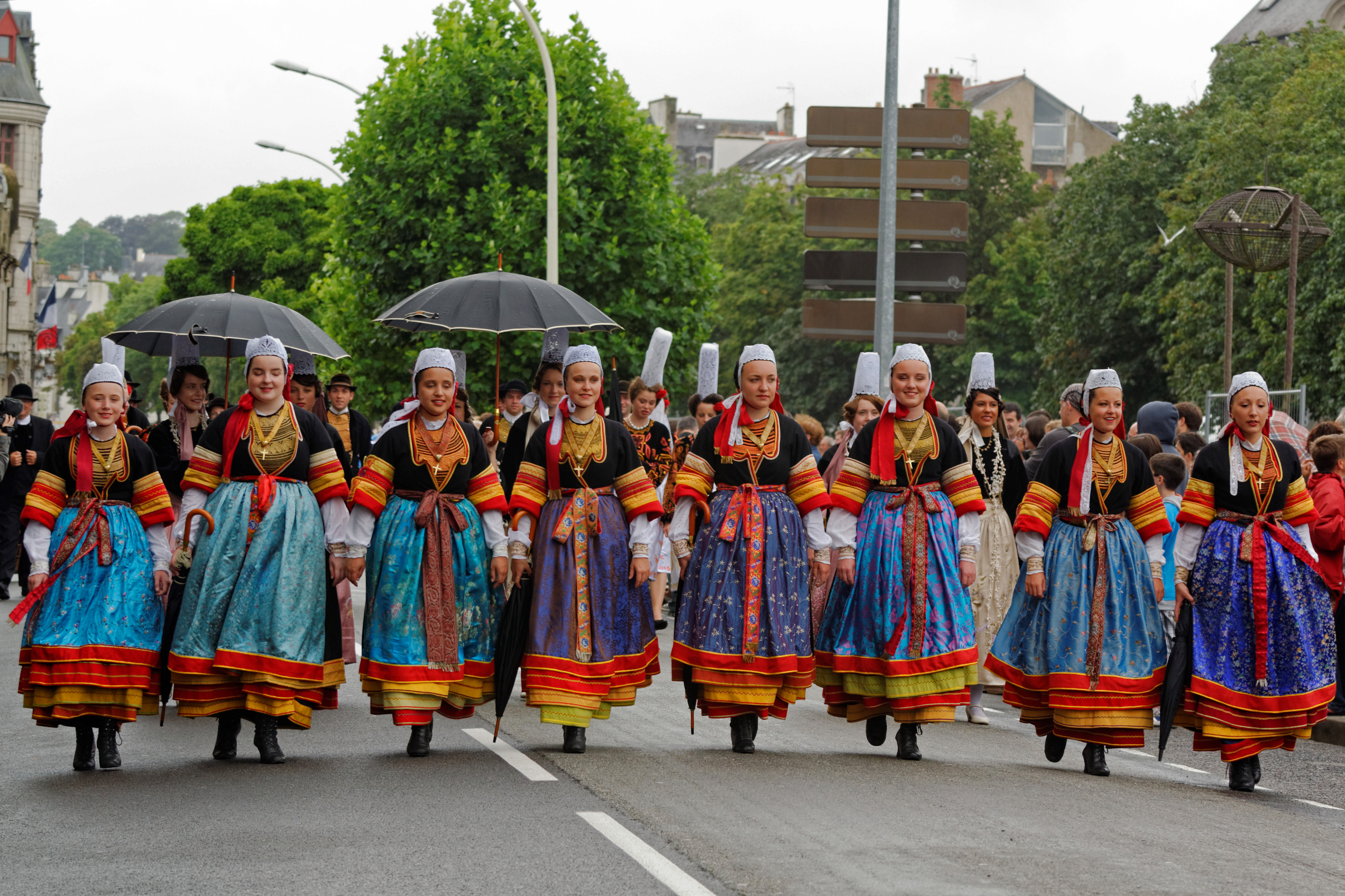 "Défilé en fête". Cercle Ar Vro Vigoudenn (Pont L’Abbé) lors du festival de Cornouaille 2013 le dimanche 28 juillet pour Kemper en Fête dans les rues de Quimper.